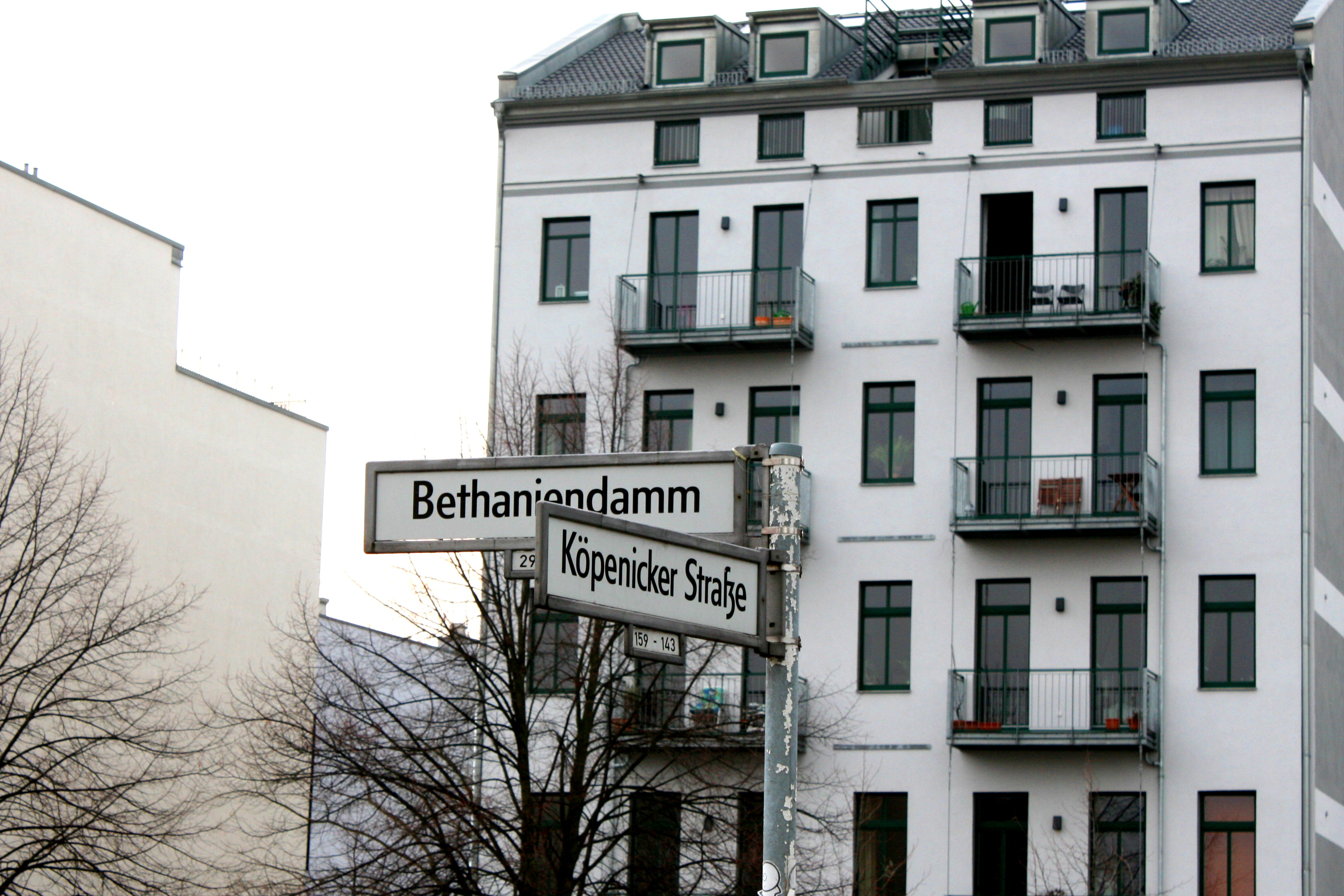 Straßenschilder der Straßen Bethaniendamm und Köpenicker Straße an der Kreuzung dieser beiden Straßen an der Grenze der Berliner bezirke Mitte und Friedrichshain-Kreuzberg